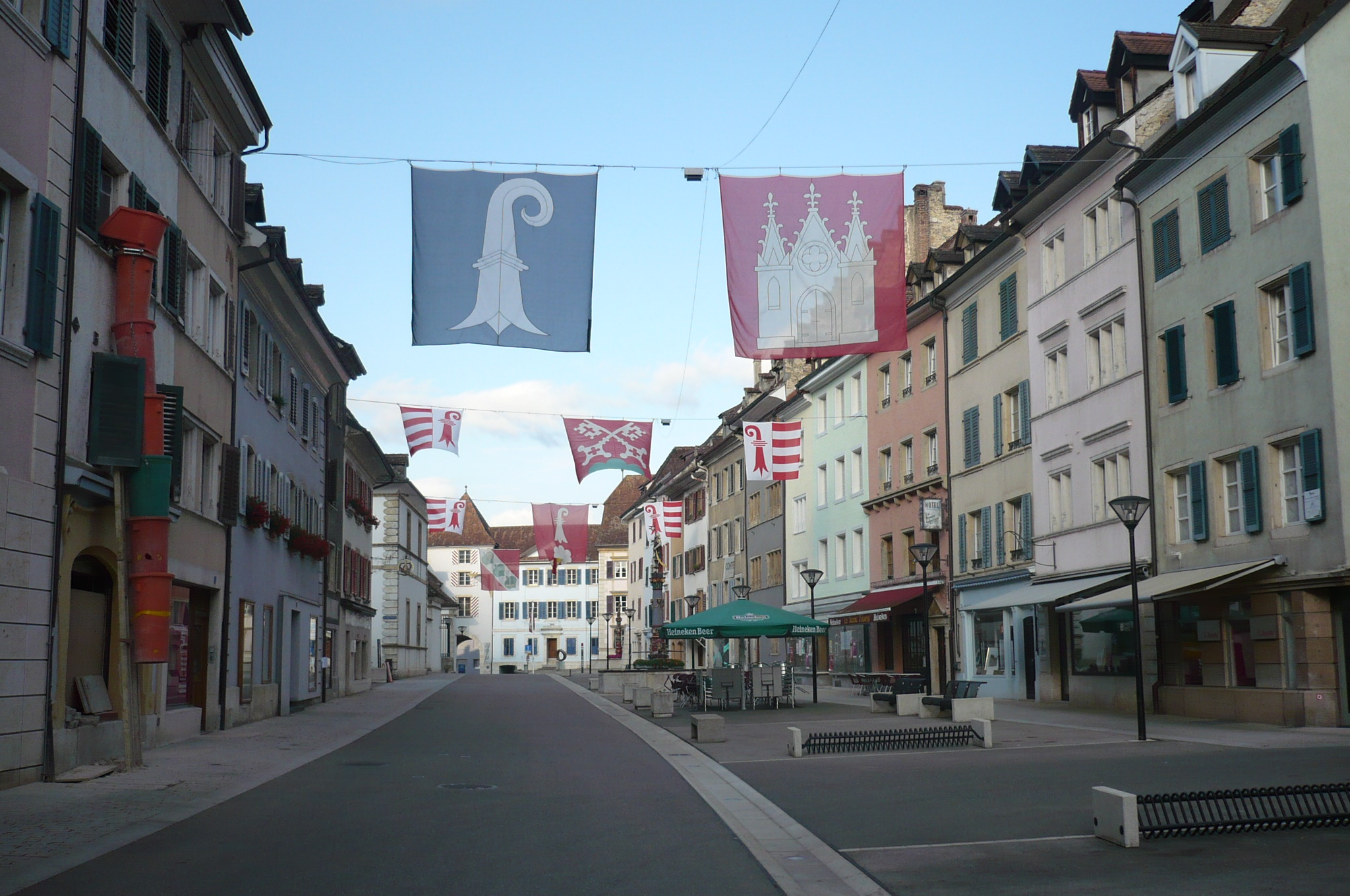 Delémont; Rue des romanis